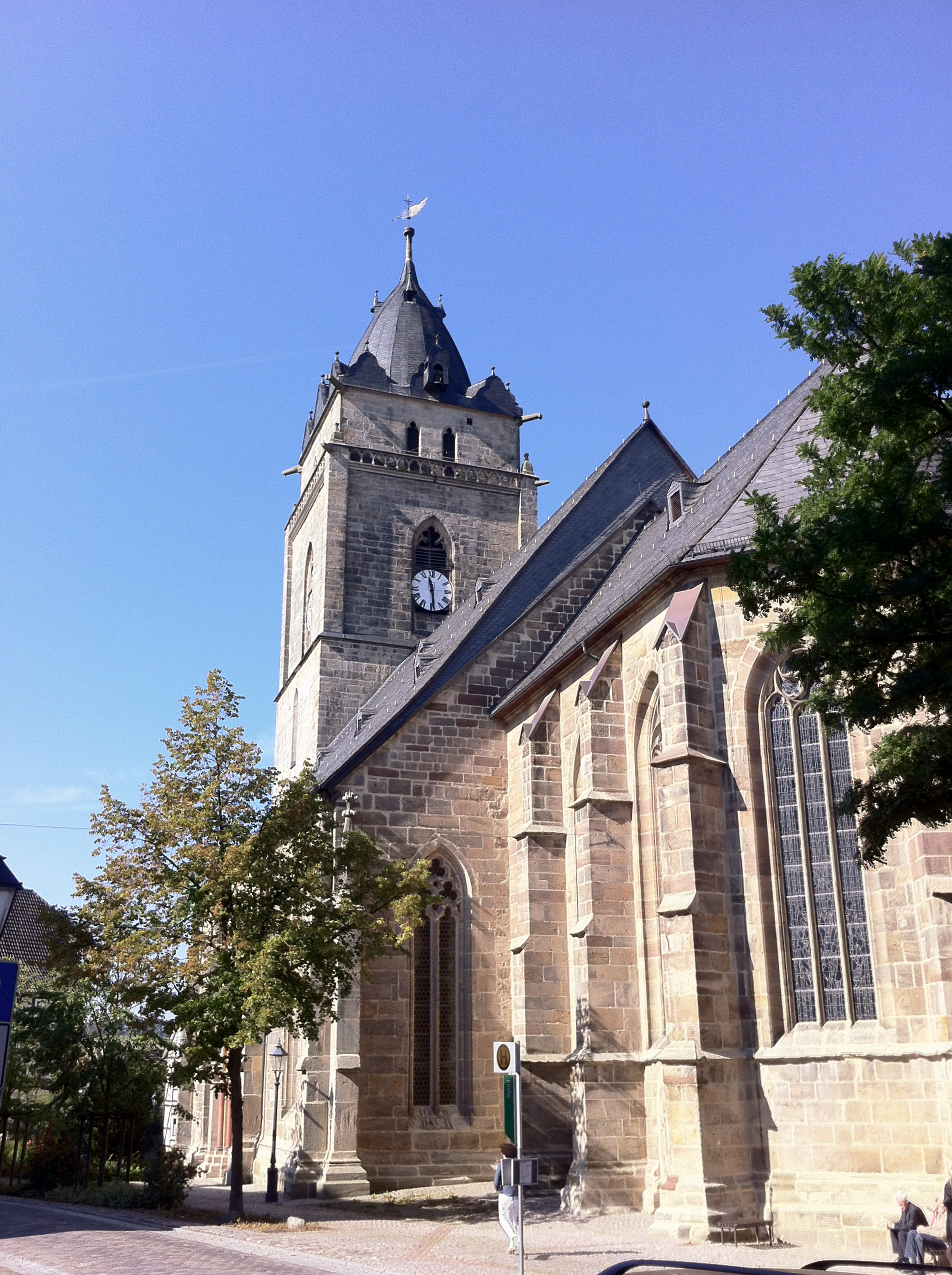 Dreischiffige, dreijochige Hallenkirche aus dem 13. Jahrhundert. Wahrzeichen der Stadt WolfhagenThis is a photograph of an architectural monument.